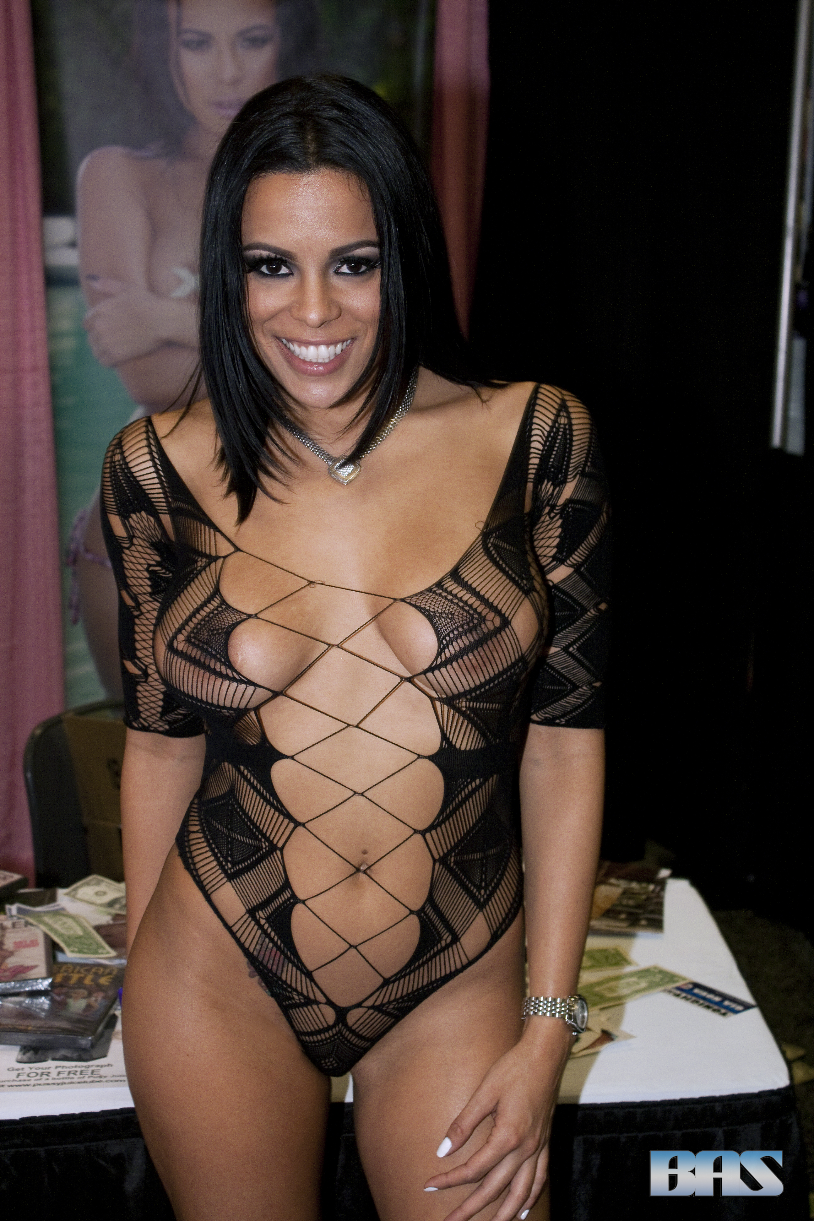 ExxxNJ14_133bas